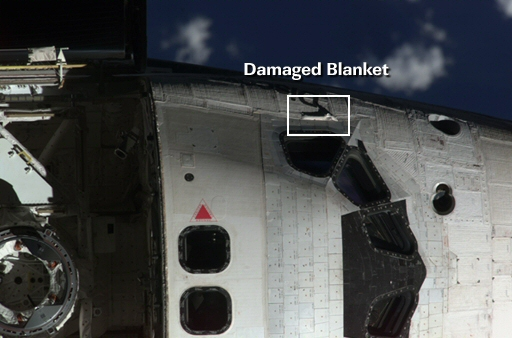 STS-114 damaged blanket